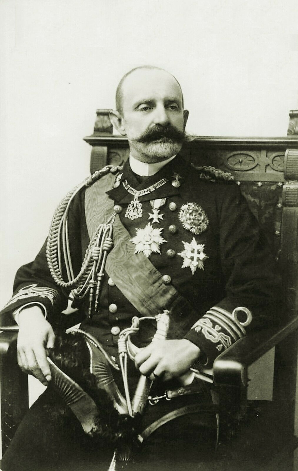 Tommaso Alberto di Savoia, secondo Duca di Genova.